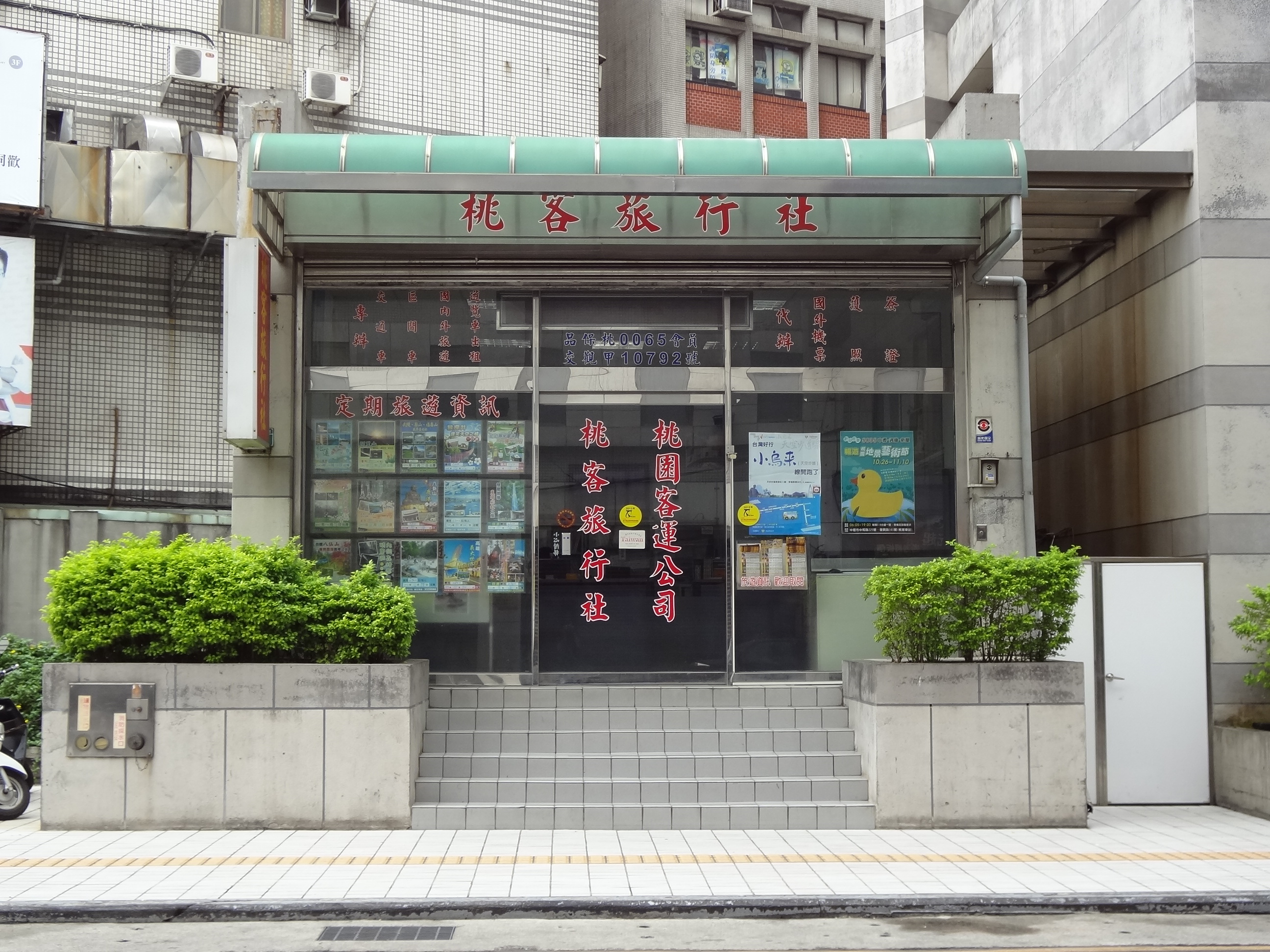 桃客旅行社總部，位於桃園縣桃園市大同路48號1樓。